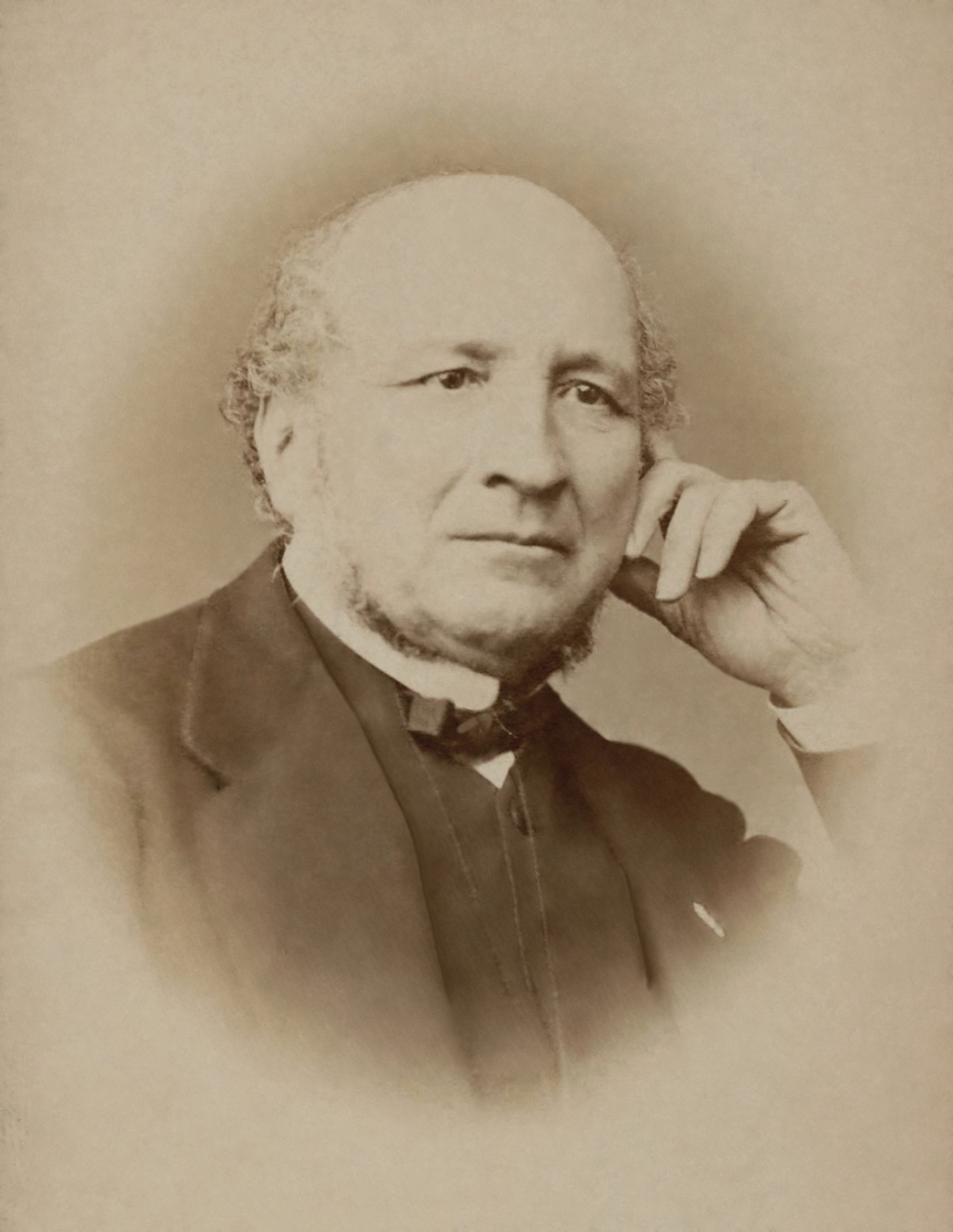 Marc Antoine Calmon (1815 - 1890), homme politique français.